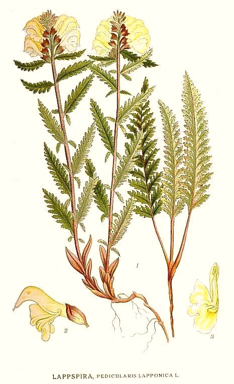 Original Description Lappspira, Pedicularis lapponica L.